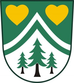 Rozkoš